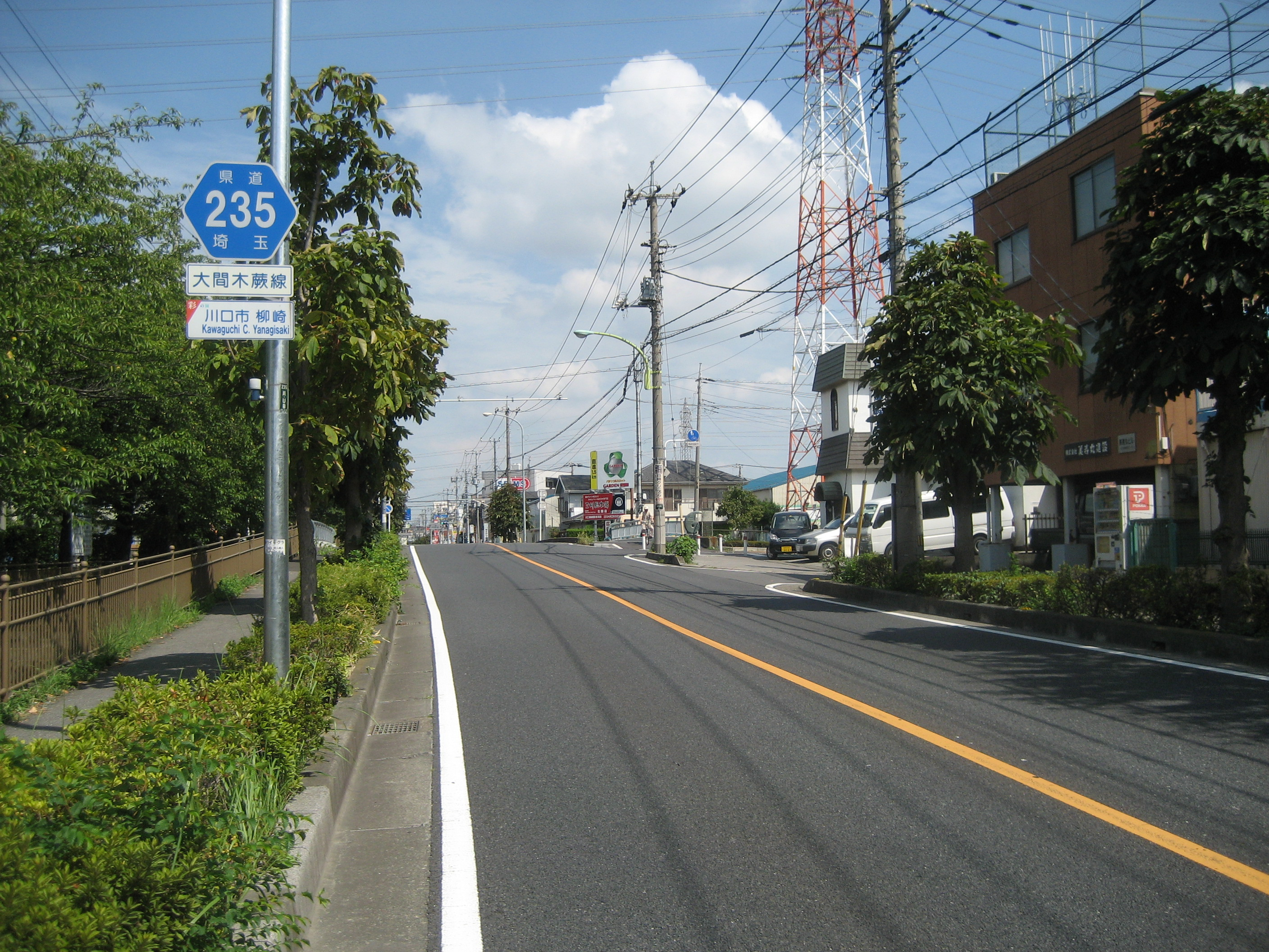 埼玉県道235号線川口市柳崎付近